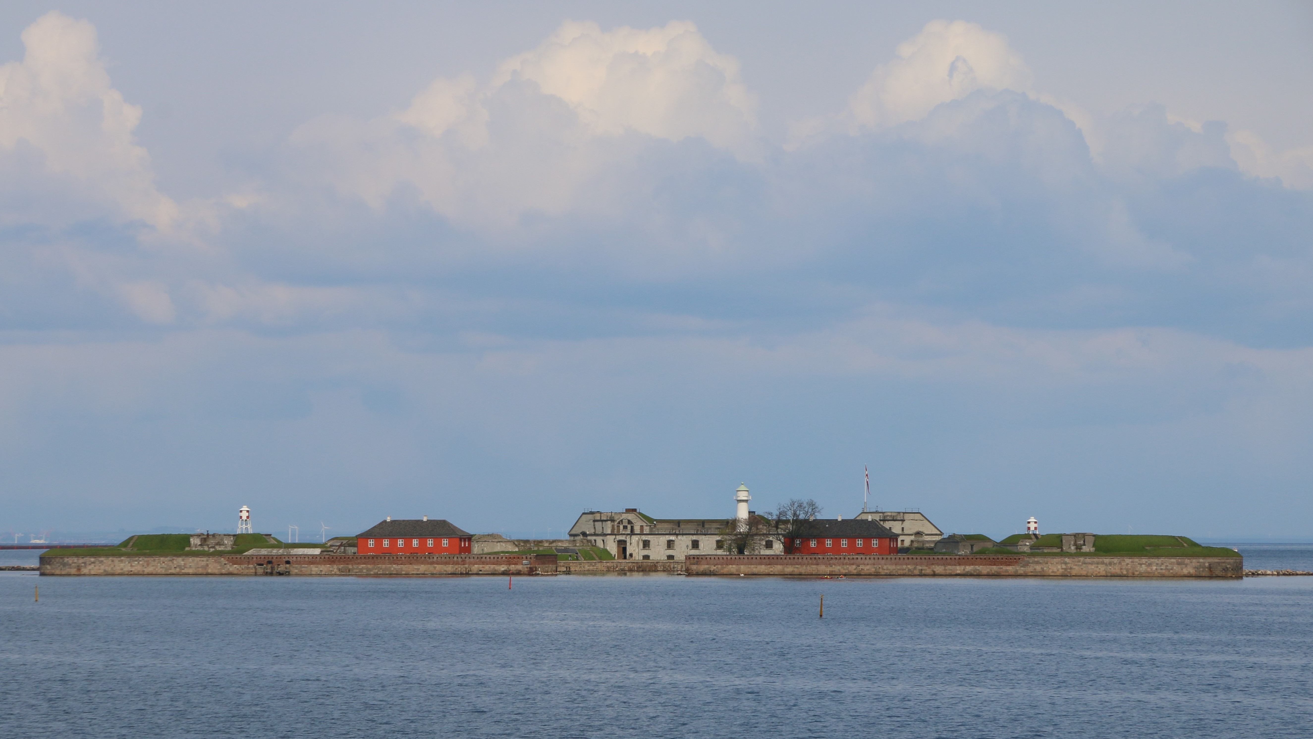 Øy utenfor Østerhavn i København - Copenhagen - Denmark